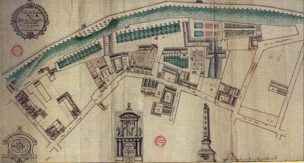 carte de la ville de Reims, ancienne emprise des chevaliers du Temple en la ville.